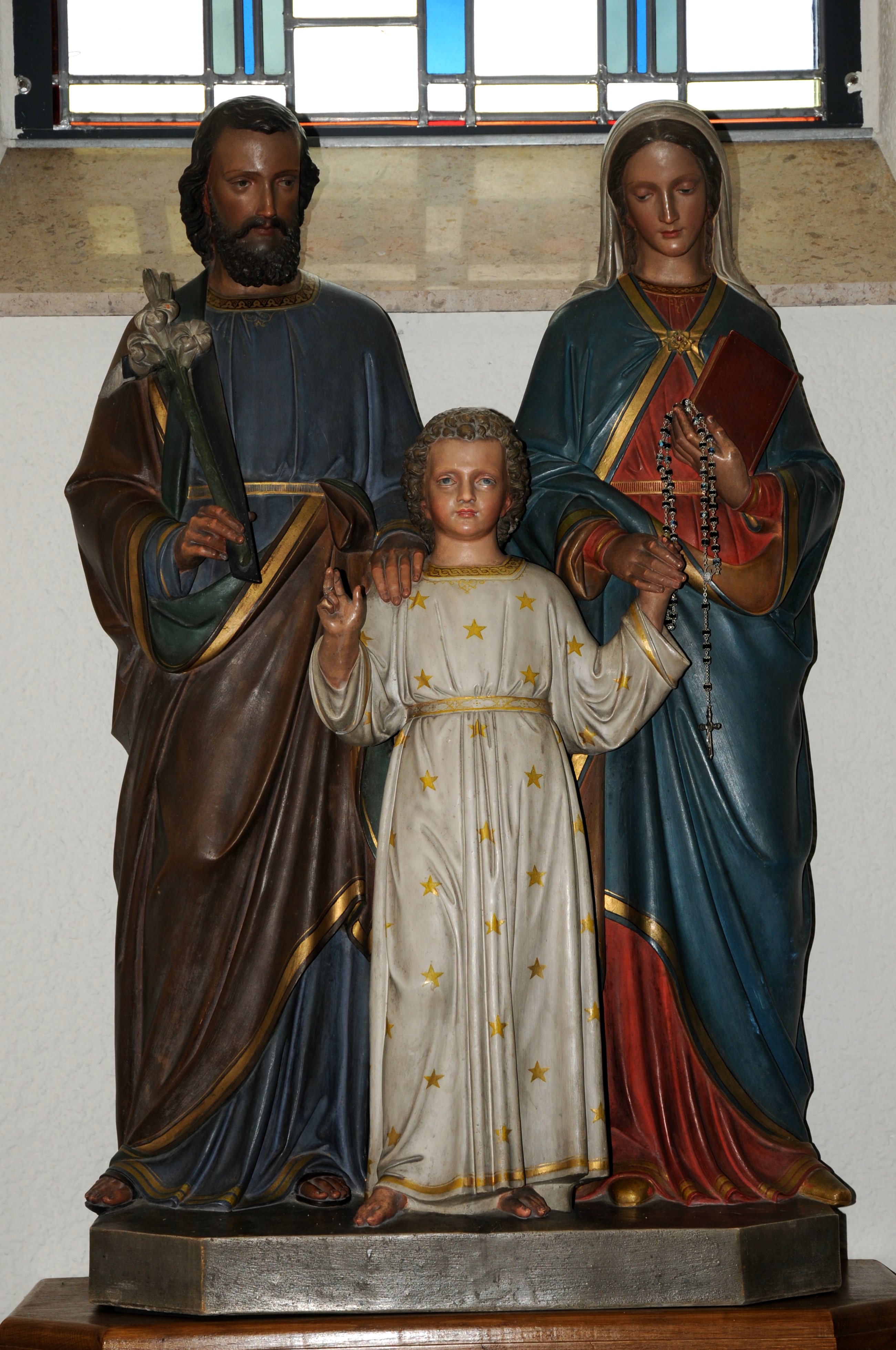 Skulptur vun der Helleger Famill an der Kierch zu Schengen.